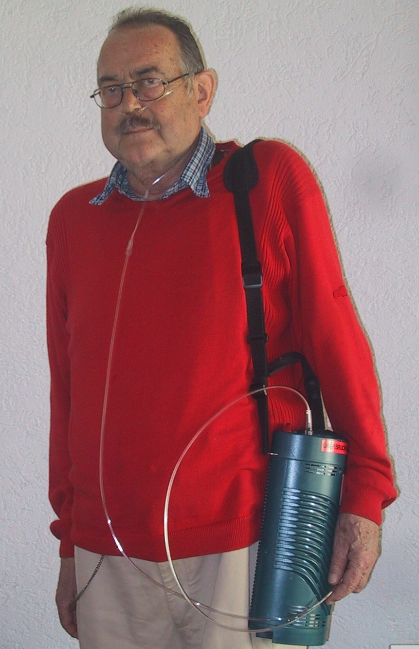 Langzeit-Sauerstoff-Patient mit Nasensonde und Satellitentank